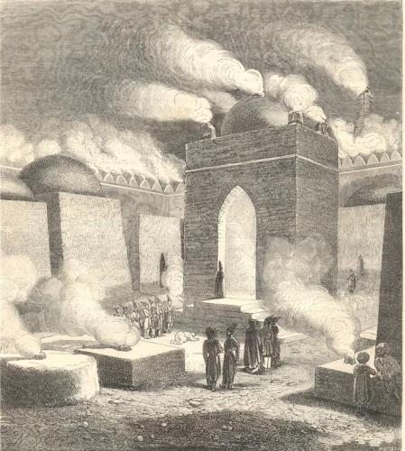 Атешгях. Гравюра Ж. П. Мойне